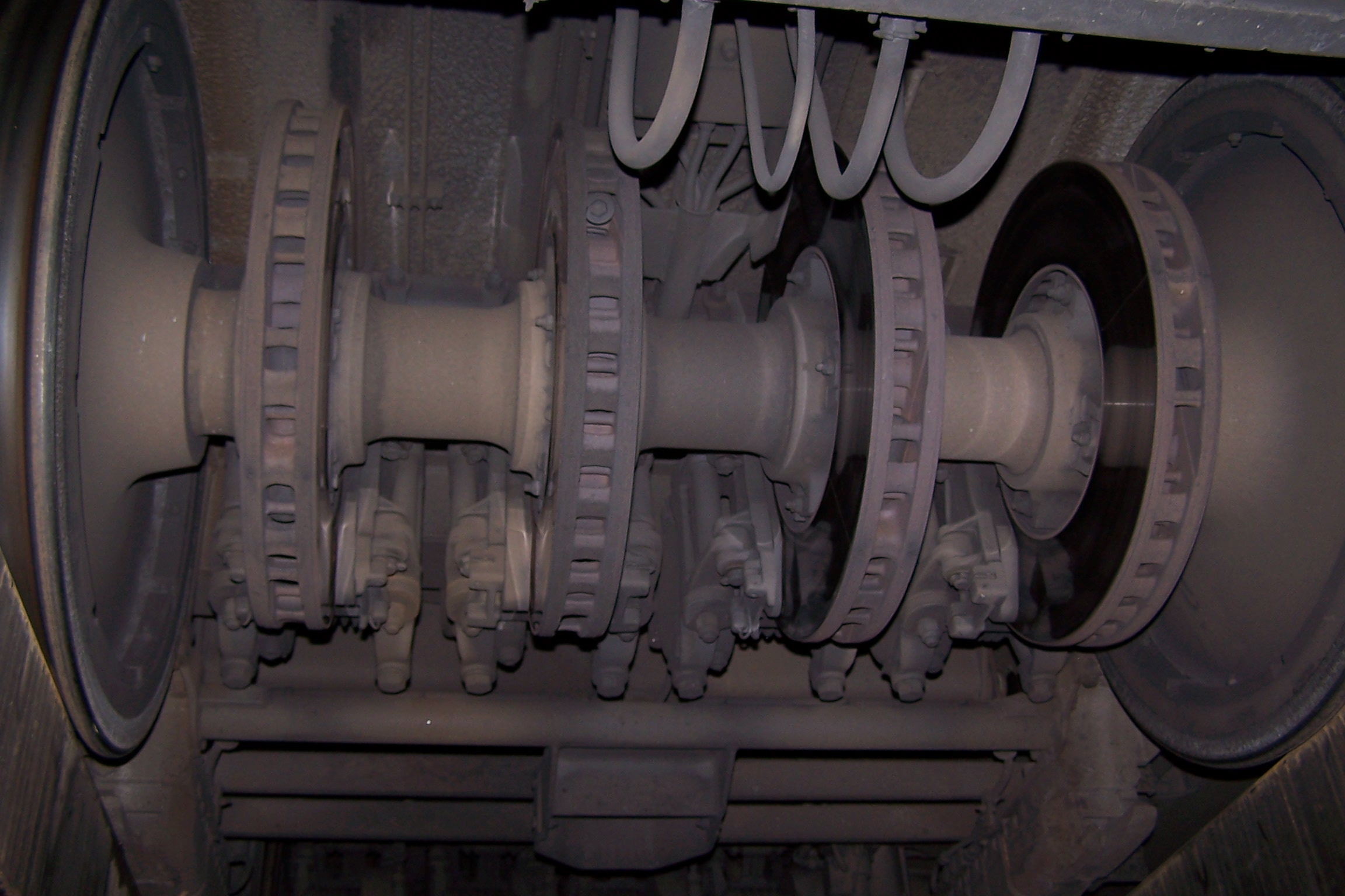 Scheibenbremse an einem Zug im Bahnbetriebswerk Hamburg-Eidelstedt